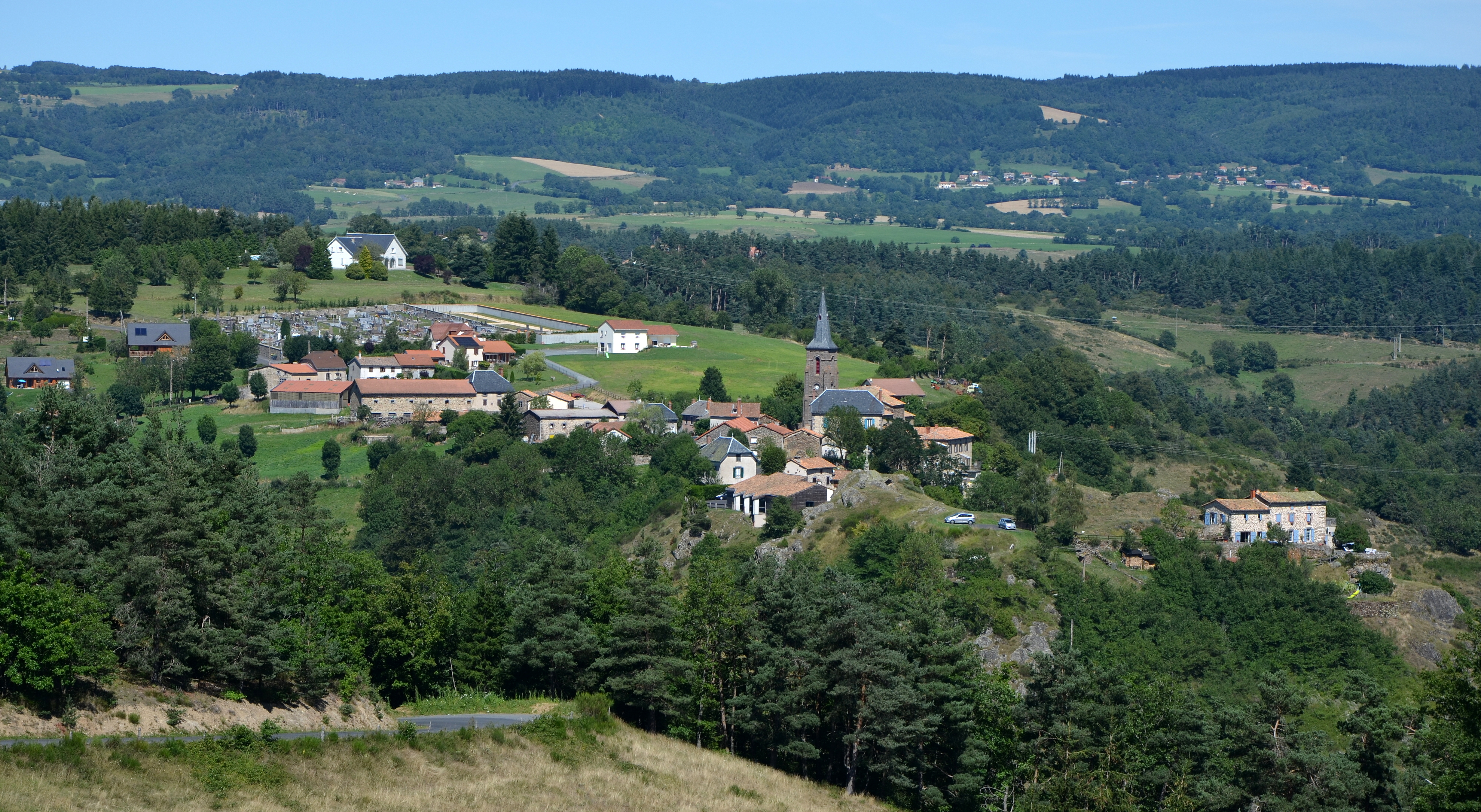 Village de Saint-Georges, Cantal, France